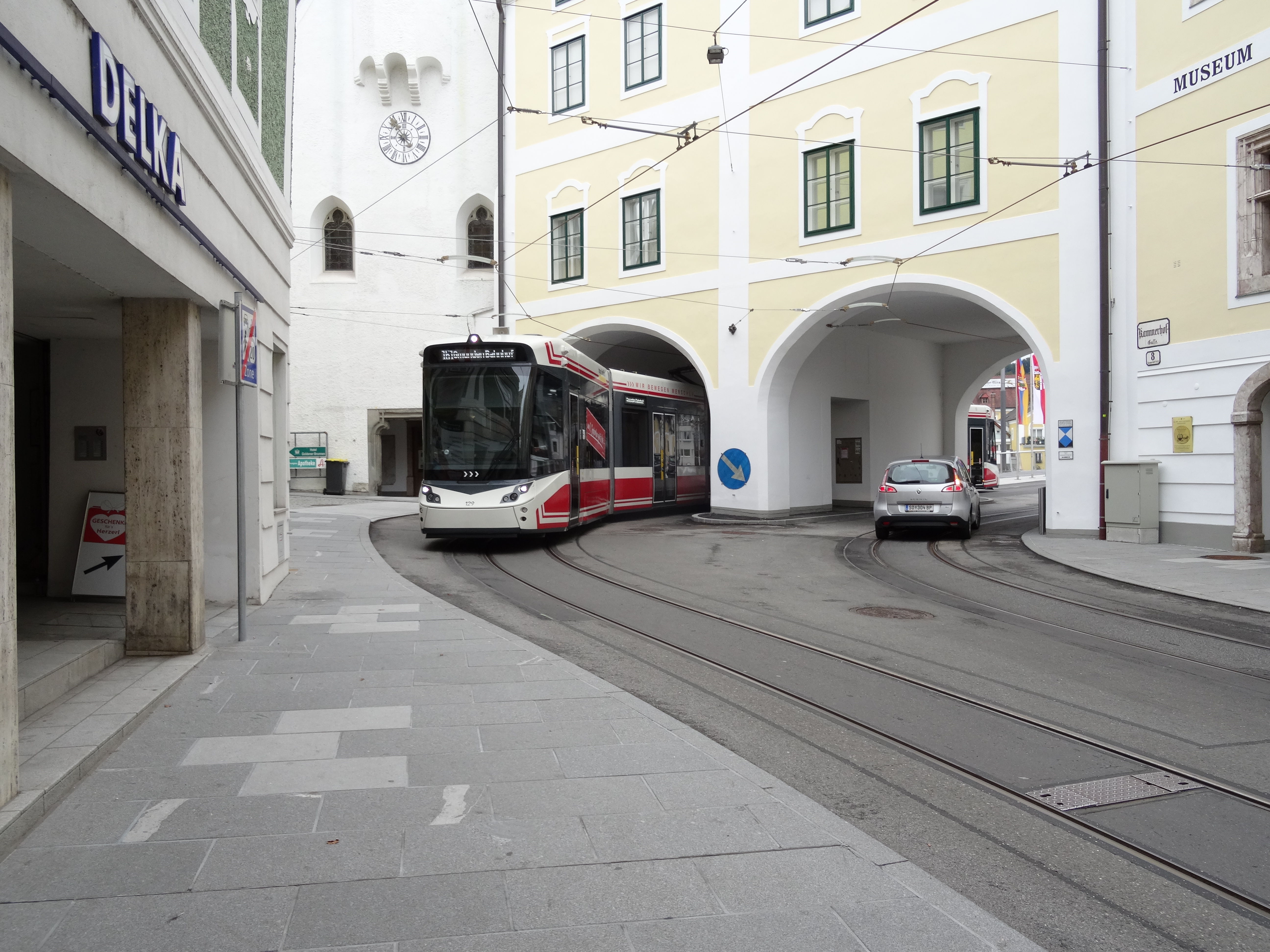 Triebwagen der Traunseetram beim Trauntor. Gmunden, Oberösterreich.